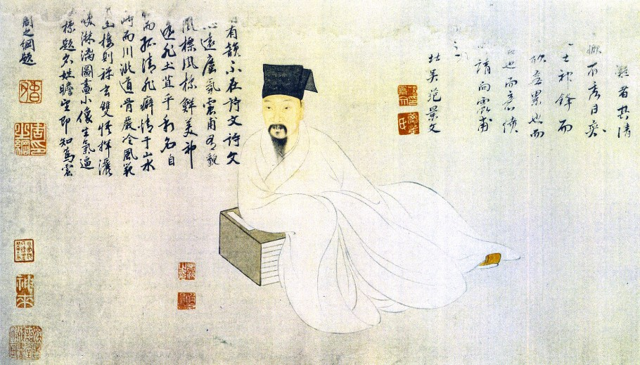 Portrait de Ge Yilong, section d'un rouleau portatif, encre et couleur sur papier, 30,6x78cm. Musée du palais impérial, Beijing, du peintre chinois Zeng Jing, 1564-1647.